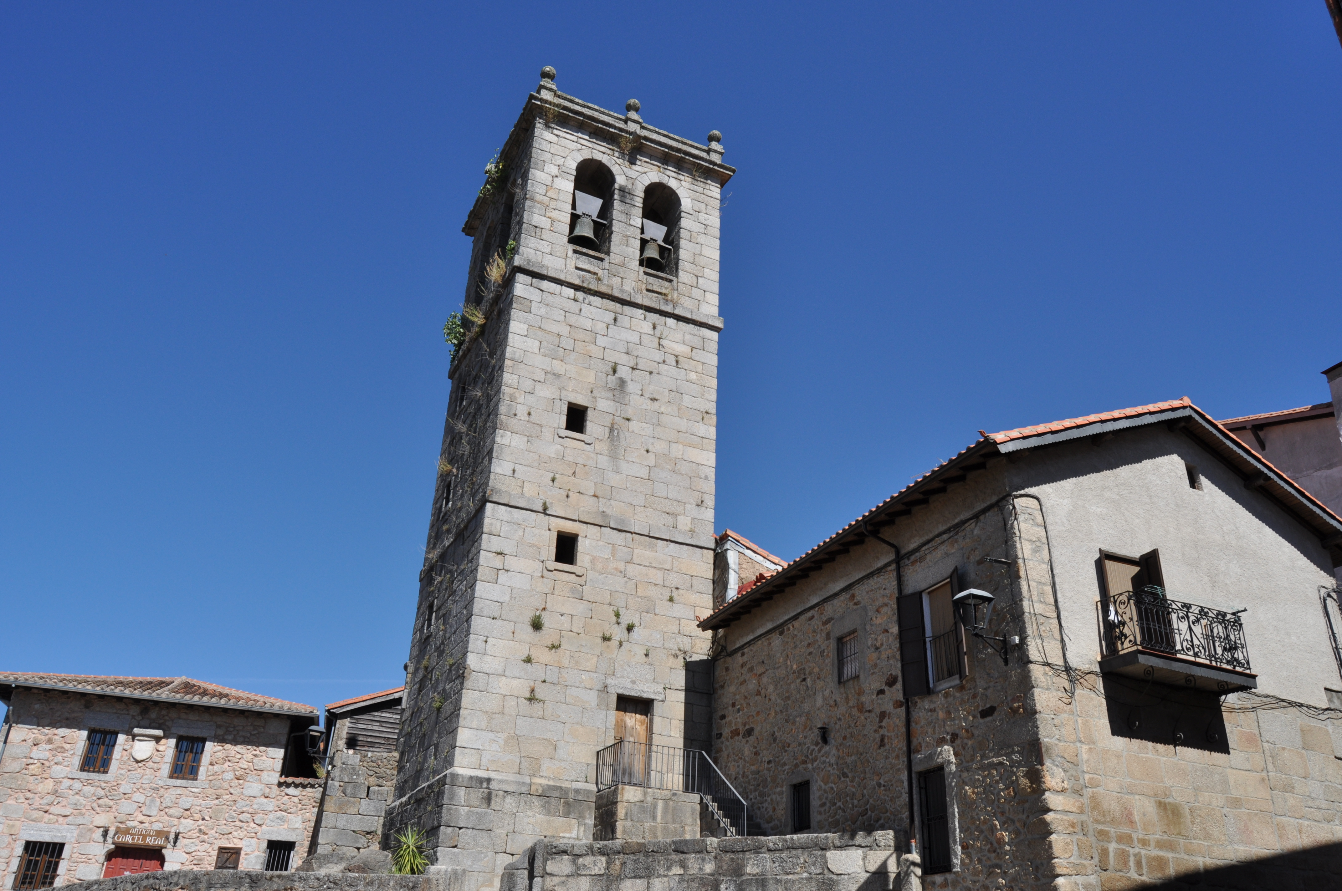 Miranda del Castañar - 012